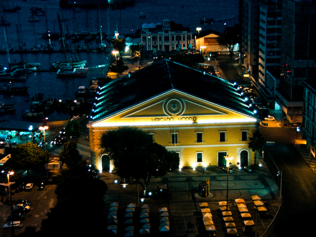 Mercado Modelo